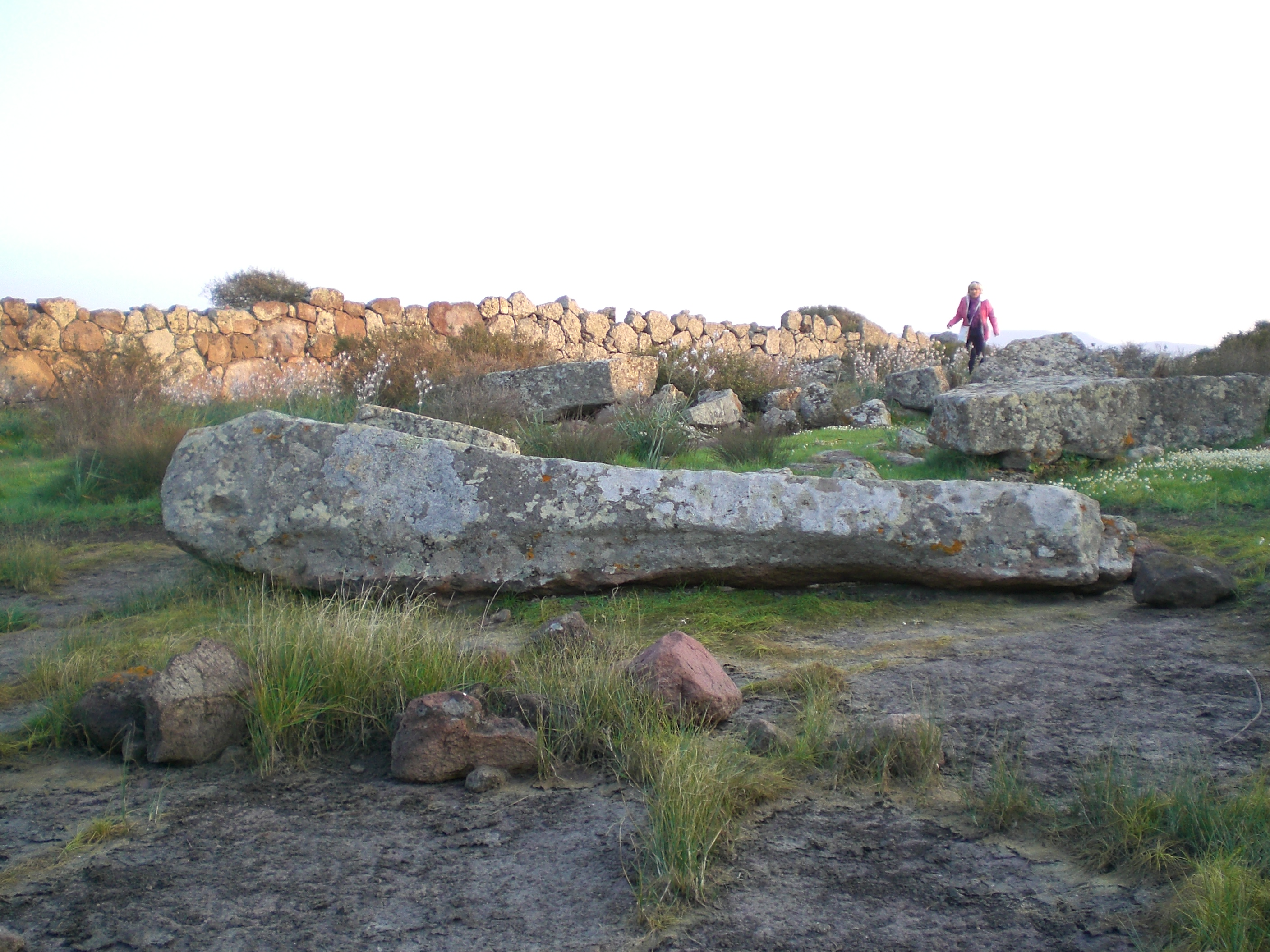 Complesso prenuragico di Monte Baranta, Olmedo, Sardegna, Italy